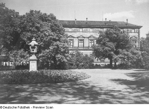 Palais Oppenheim (Palais Kaskel-Oppenheim) war ein Gebäude im Stil der Neorenaissance in Dresden. Es wurde 1845 bis 1848 von Gottfried Semper für den Bankier Martin Wilhelm Oppenheim (1781–1863) erbaut und befand sich an der Bürgerwiese 5–7. SLUB/Deutsche Fotothek der Sächsische Landesbibliothek - Staats- und Universitätsbibliothk Dresden